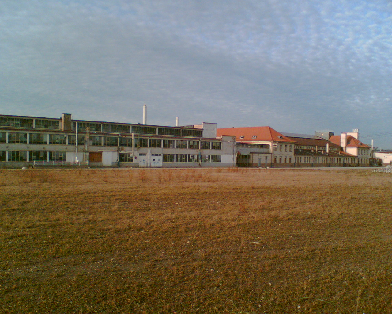 das alte Landesflughafengebäude auf dem Flugfeld Böblingen/Sindelfingen